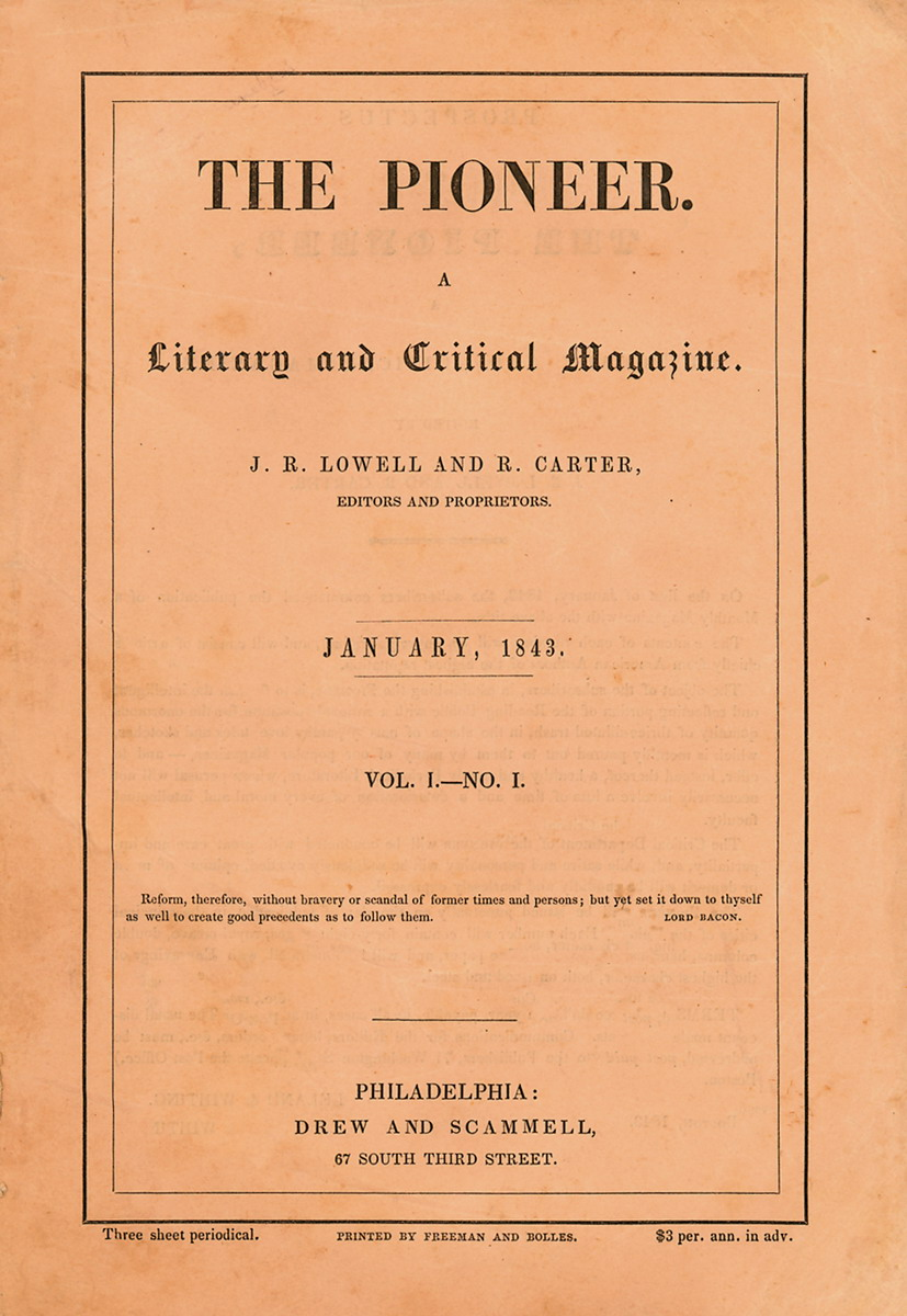 "The Tell-Tale Heart", by Edgar Allan Poe, The Pioneer, Vol. 1, No. 1, Drew and Scammell, 67 South Third Street, Philadelphia, January, 1843. Printed by Freeman and Bolles.